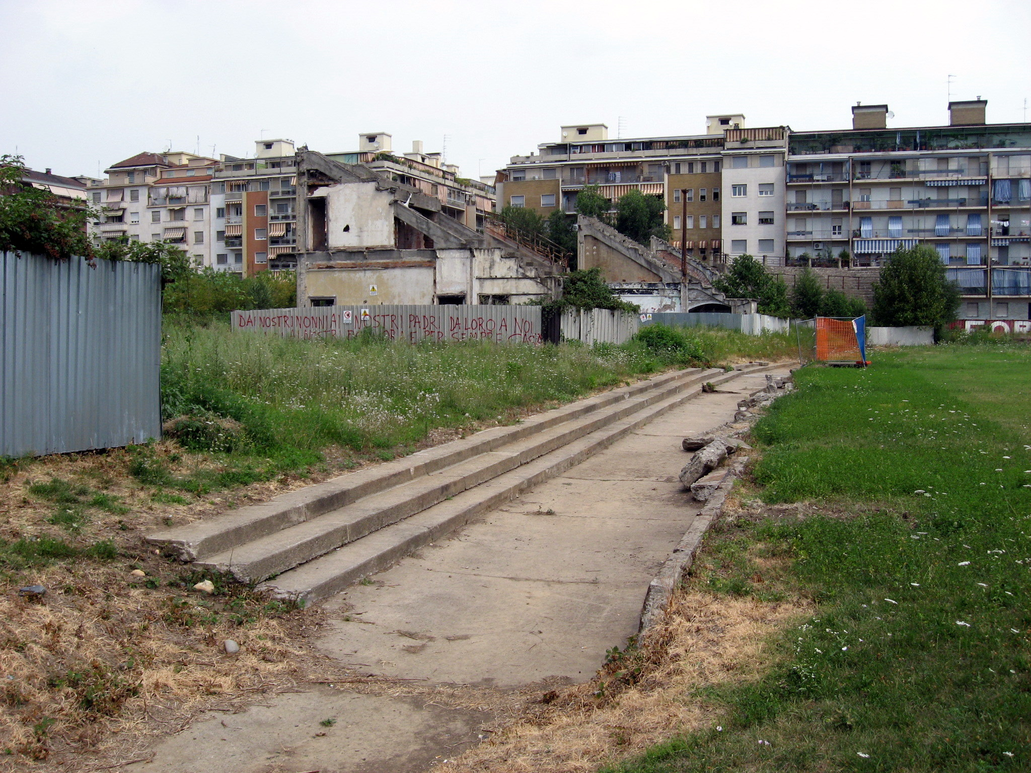 Old Filadelfia stadium in Turin